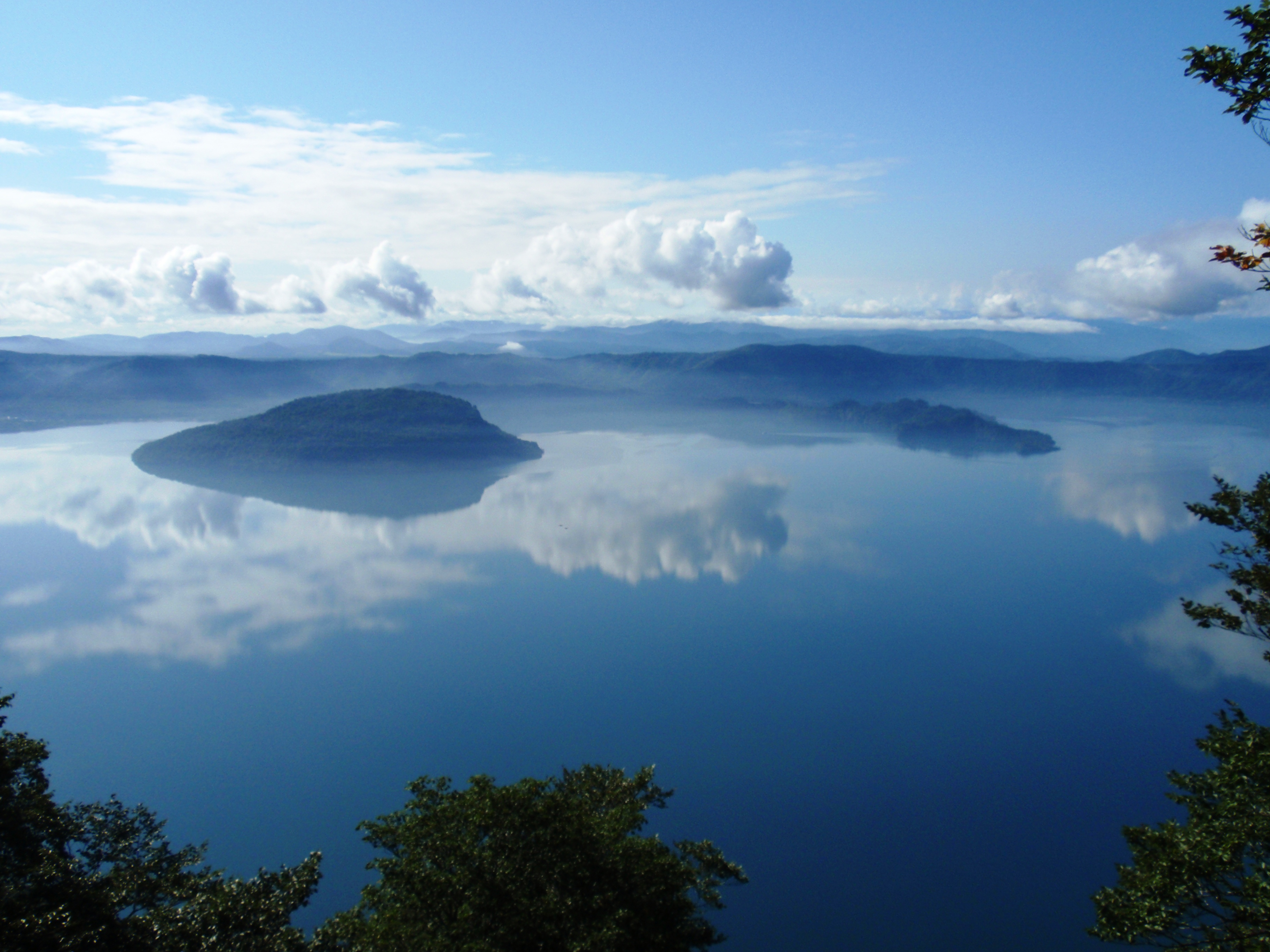 御鼻部展望台より十和田湖